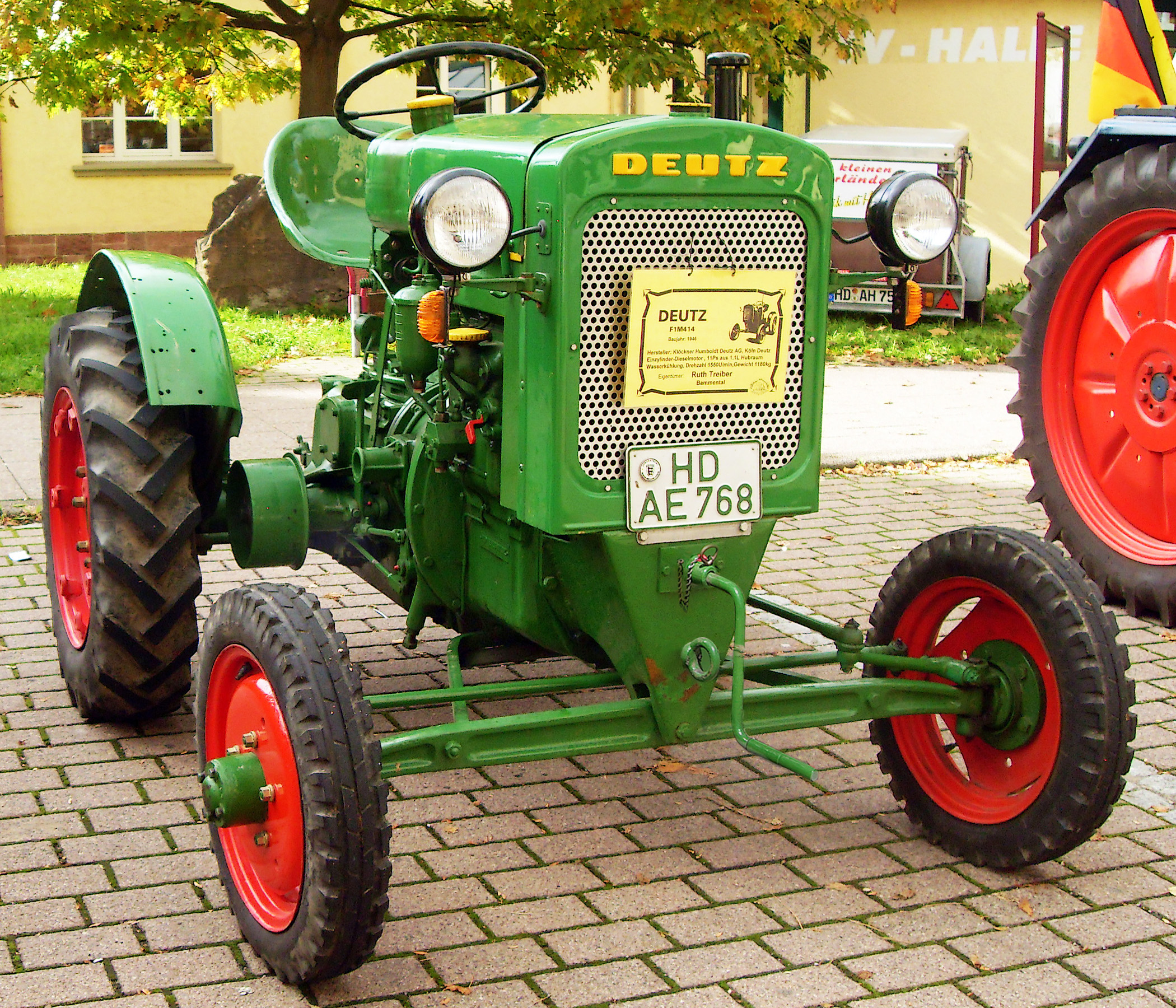 Deutz F1M414 w Bammental (Niemcy)